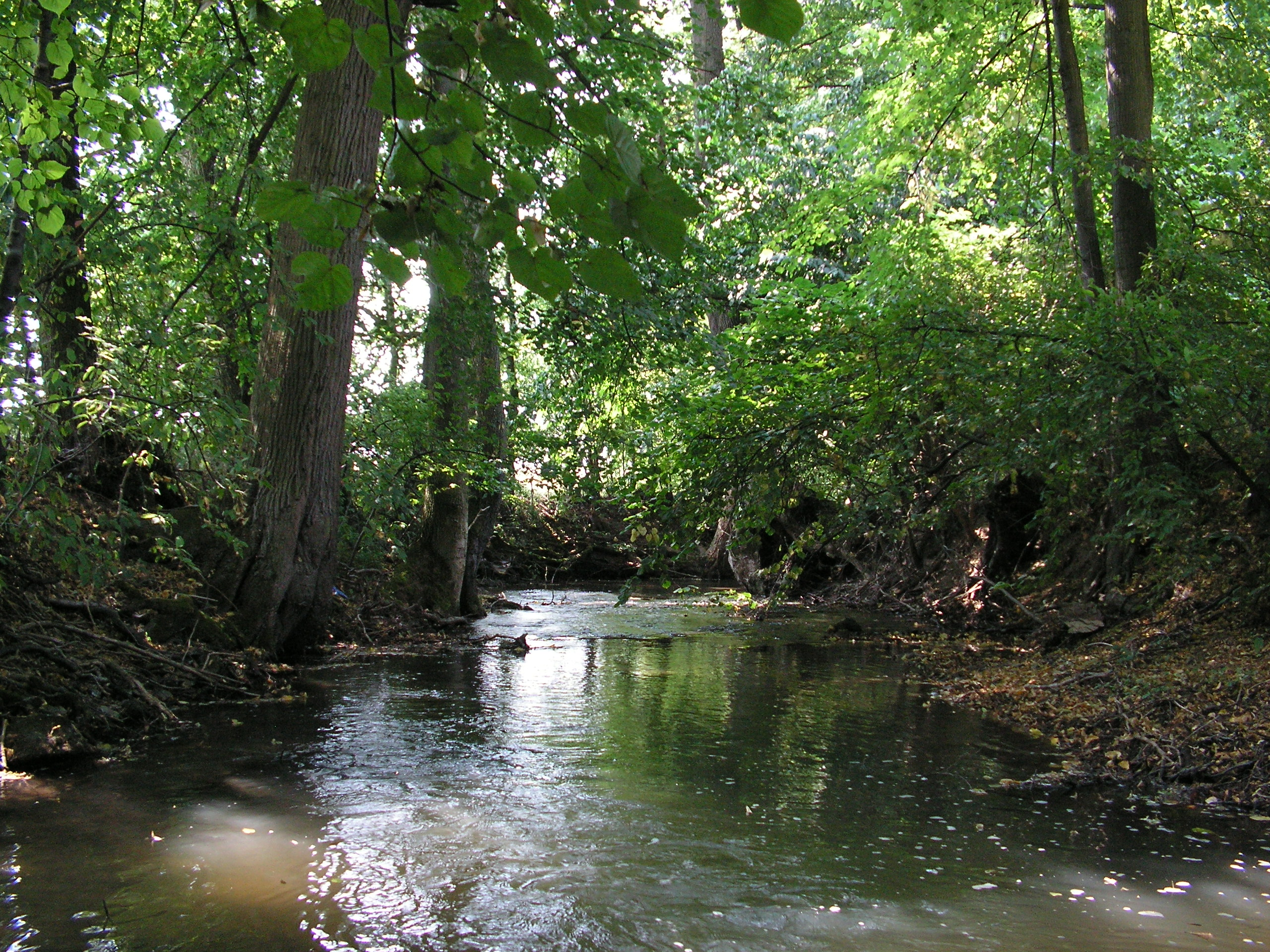 Říčka Desná pod ústím Morašického potoka u Tržku